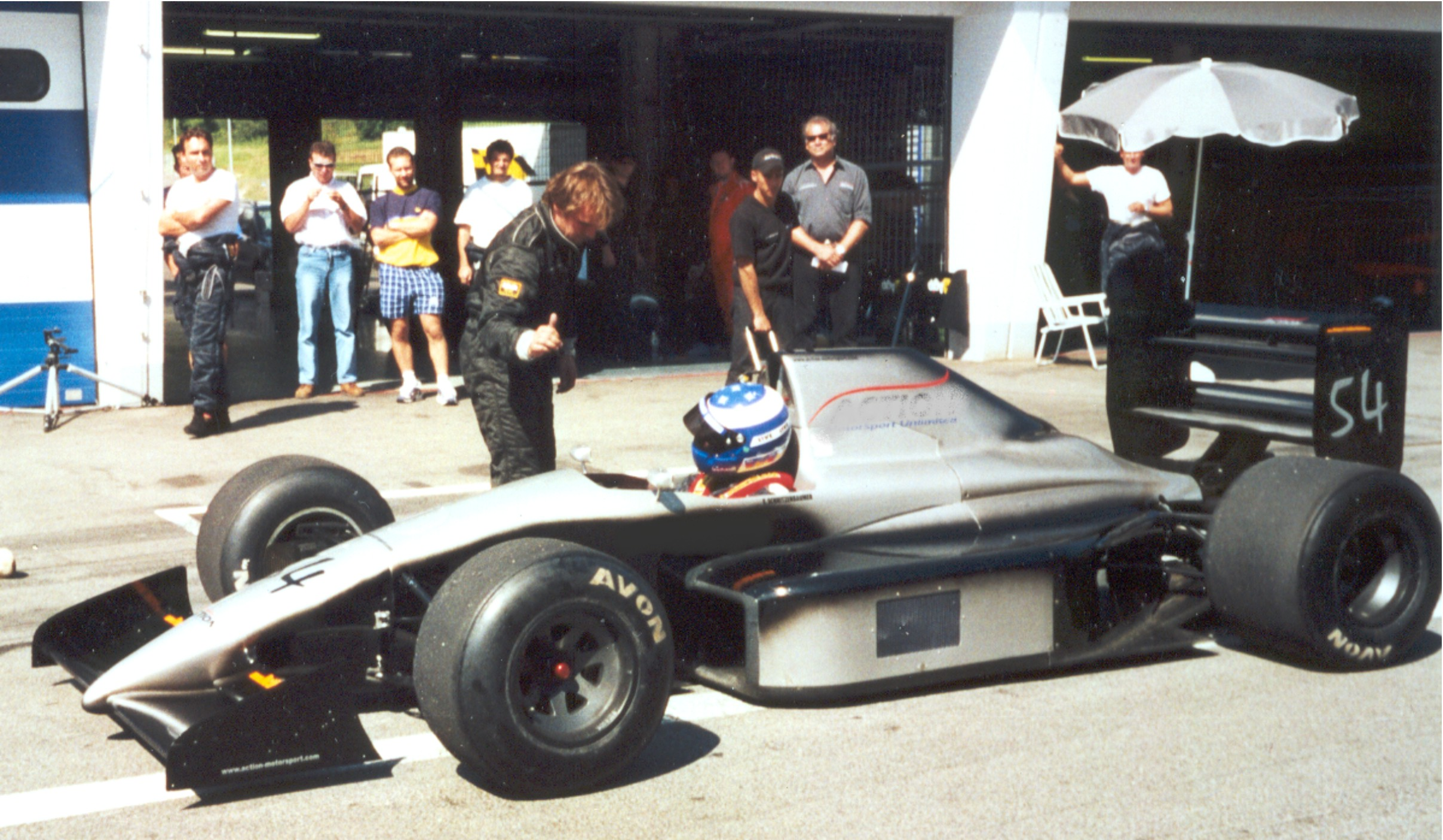 Ingo Iserhardt im Coloni Formel 1 bei Testfahrten auf dem A1 Ring 2001